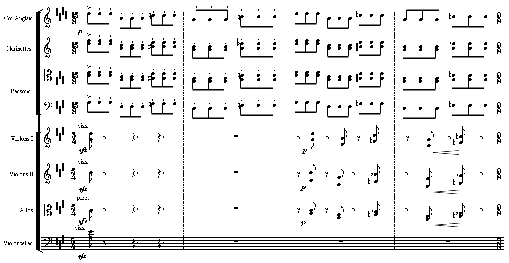 Debussy - Fêtes - à 15 temps